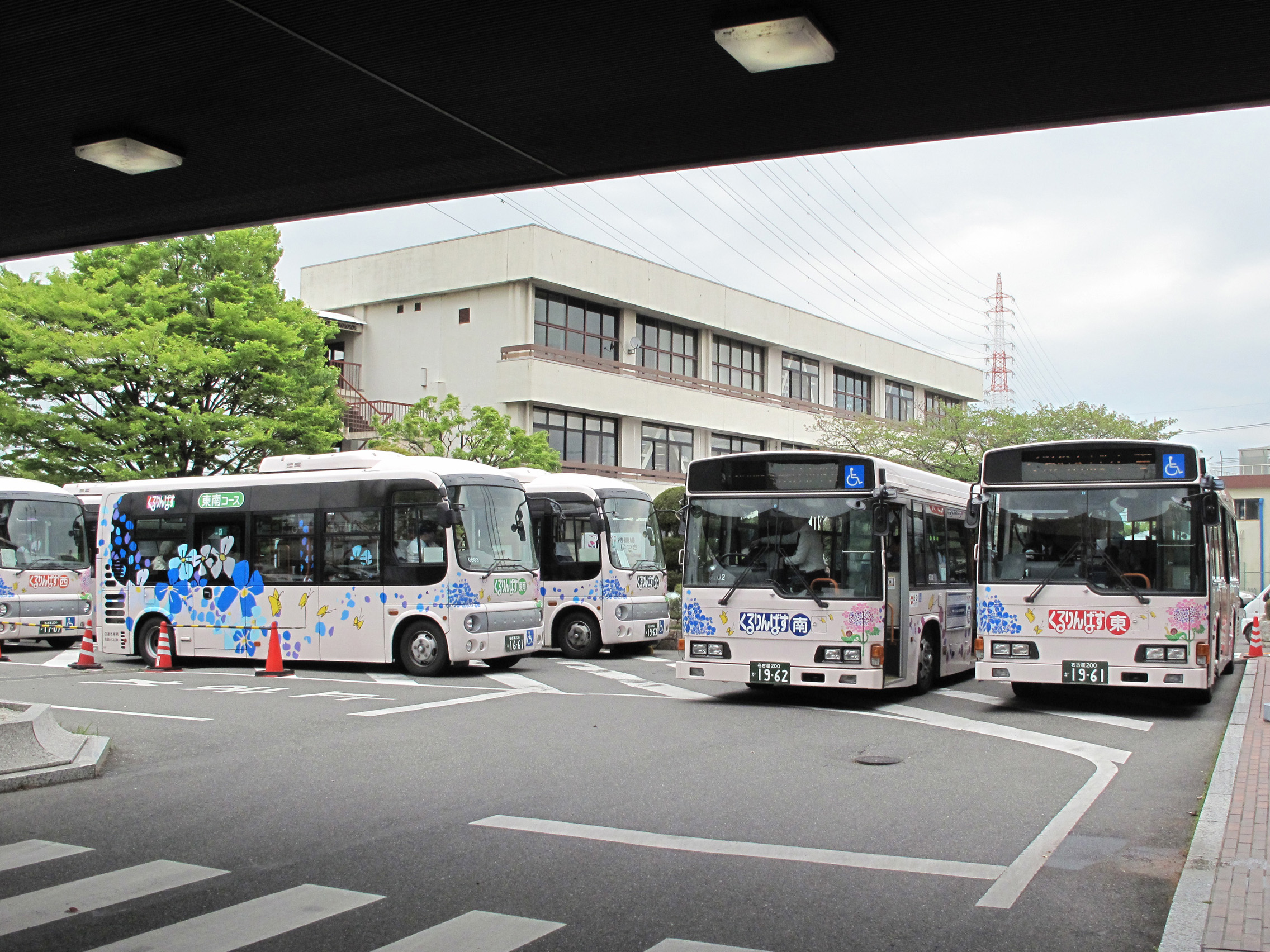 くるりんばす 日進市役所にて